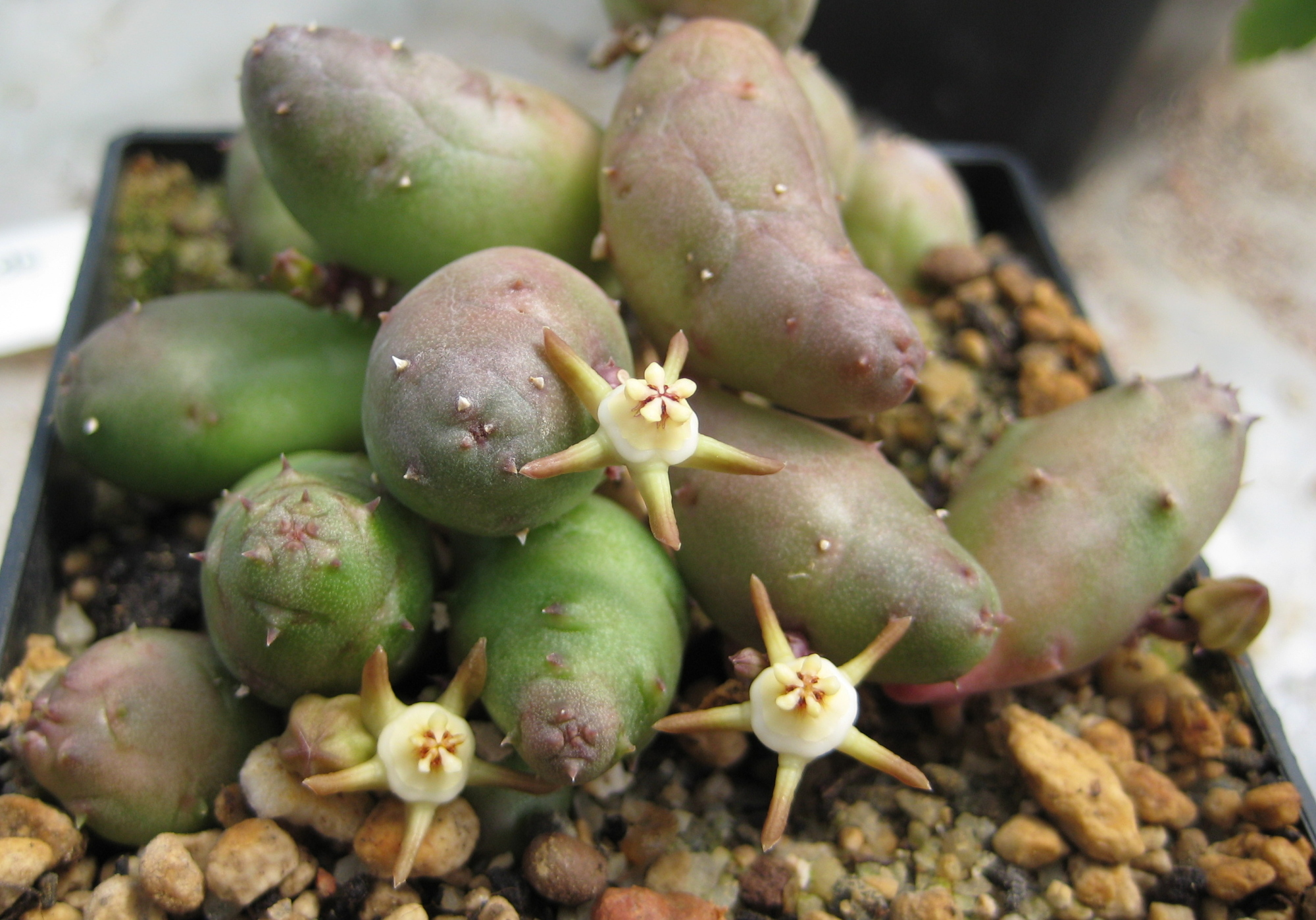 Duvalia parviflora in Kultur